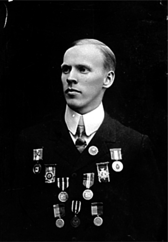 PORTRETT OTTO MONSEN MED MEDALJER, SKØYTELØPER, HØYDEHOPPER. Bildet er en gave fra Ragnhilda Eriksen til H. I. L. 24-8-1950. Han var en av landets beste høydehoppere en stund med hele 7 norgesmesterskap. Se Idrett i Hamar gjennom 100 år. bilde nr. 102.